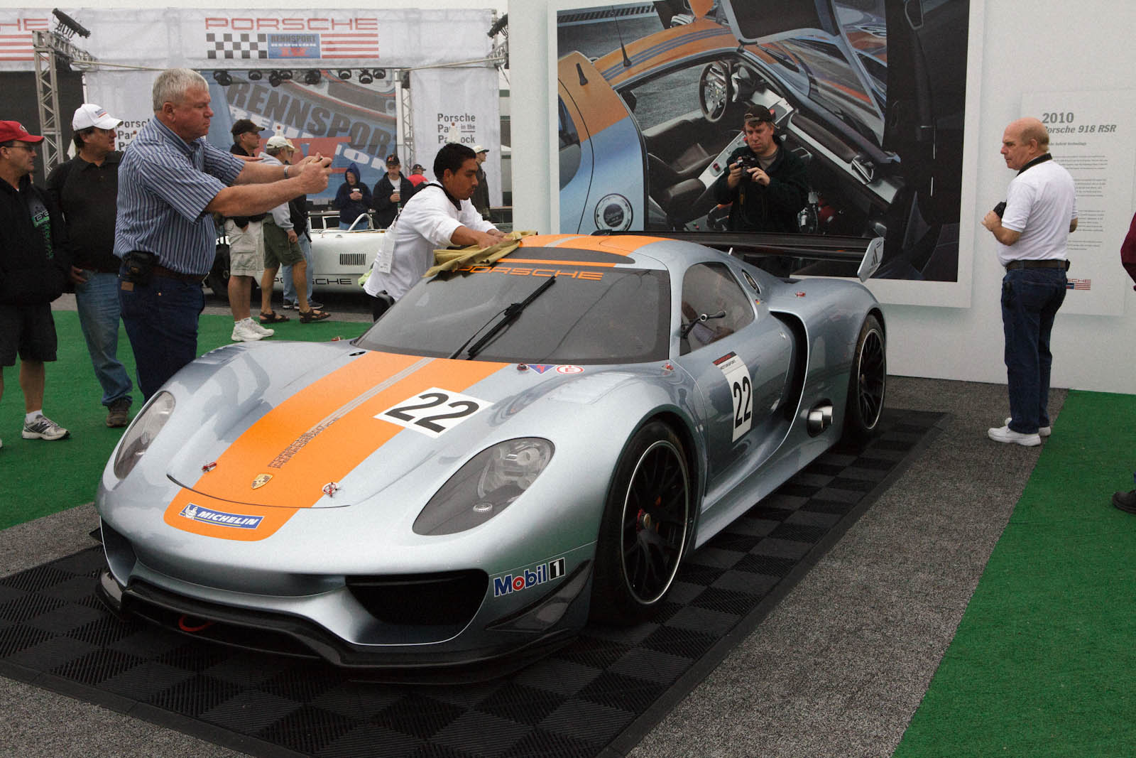 Porsche Rennsport Reunion IV